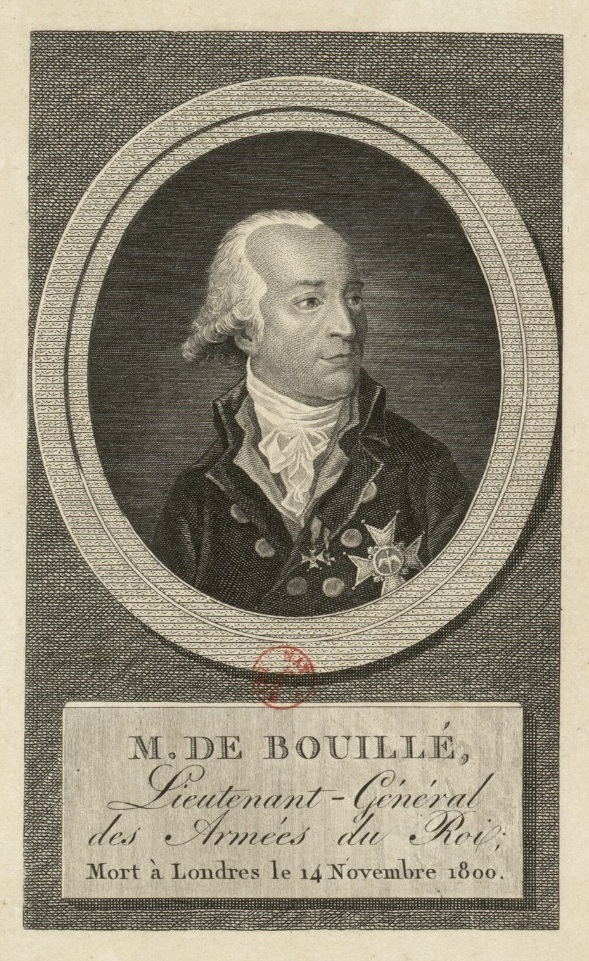 M. de Bouillé, Lieutenant-Général des Armées du Roi, mort à Londres le 14 novembre 1800. Estampe (eau-forte, burin).